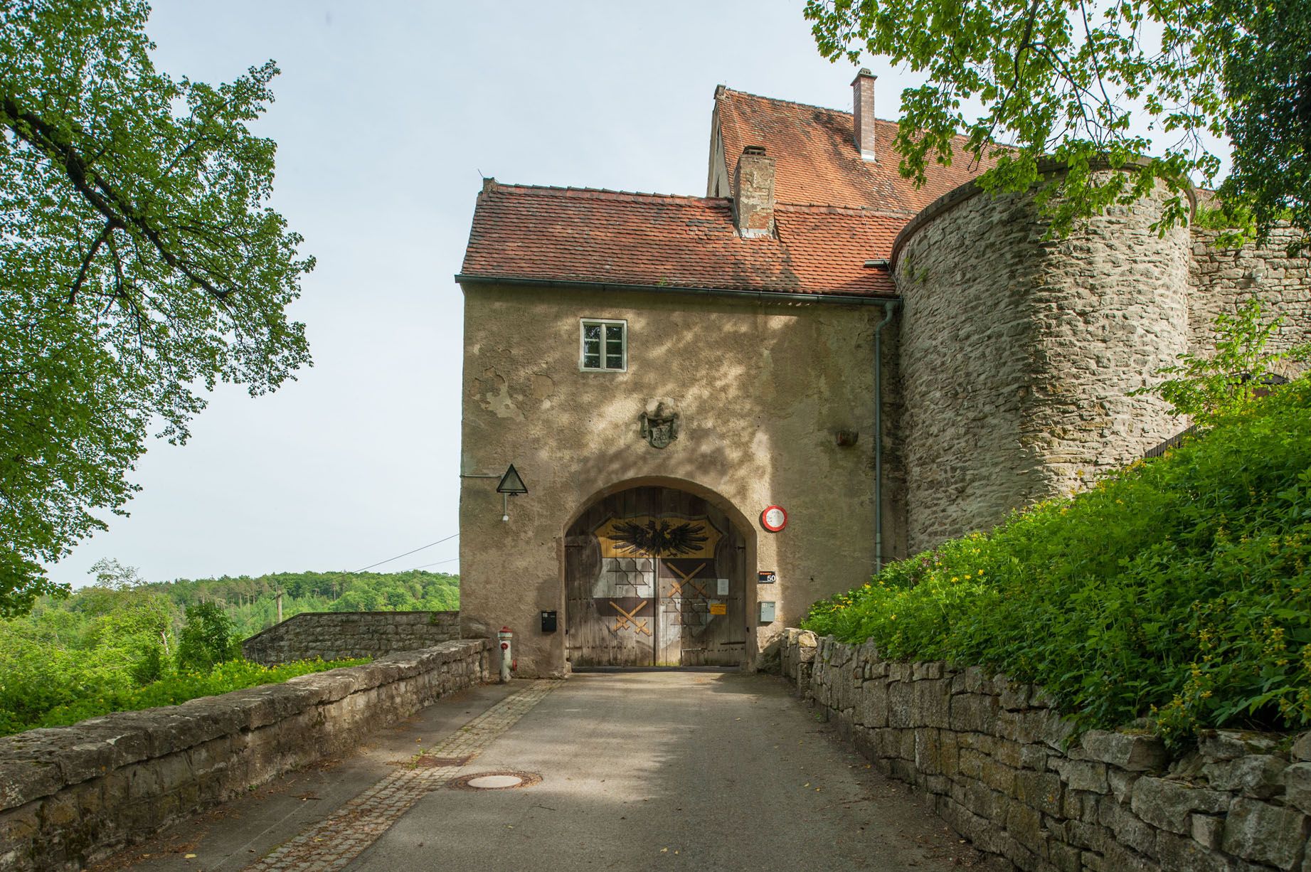 Schlosstor. 17./18. Jahrhundert nördlichem Torhaus, Nordturm, einschließlich Reste der Befestigung.This is a photograph of an architectural monument.